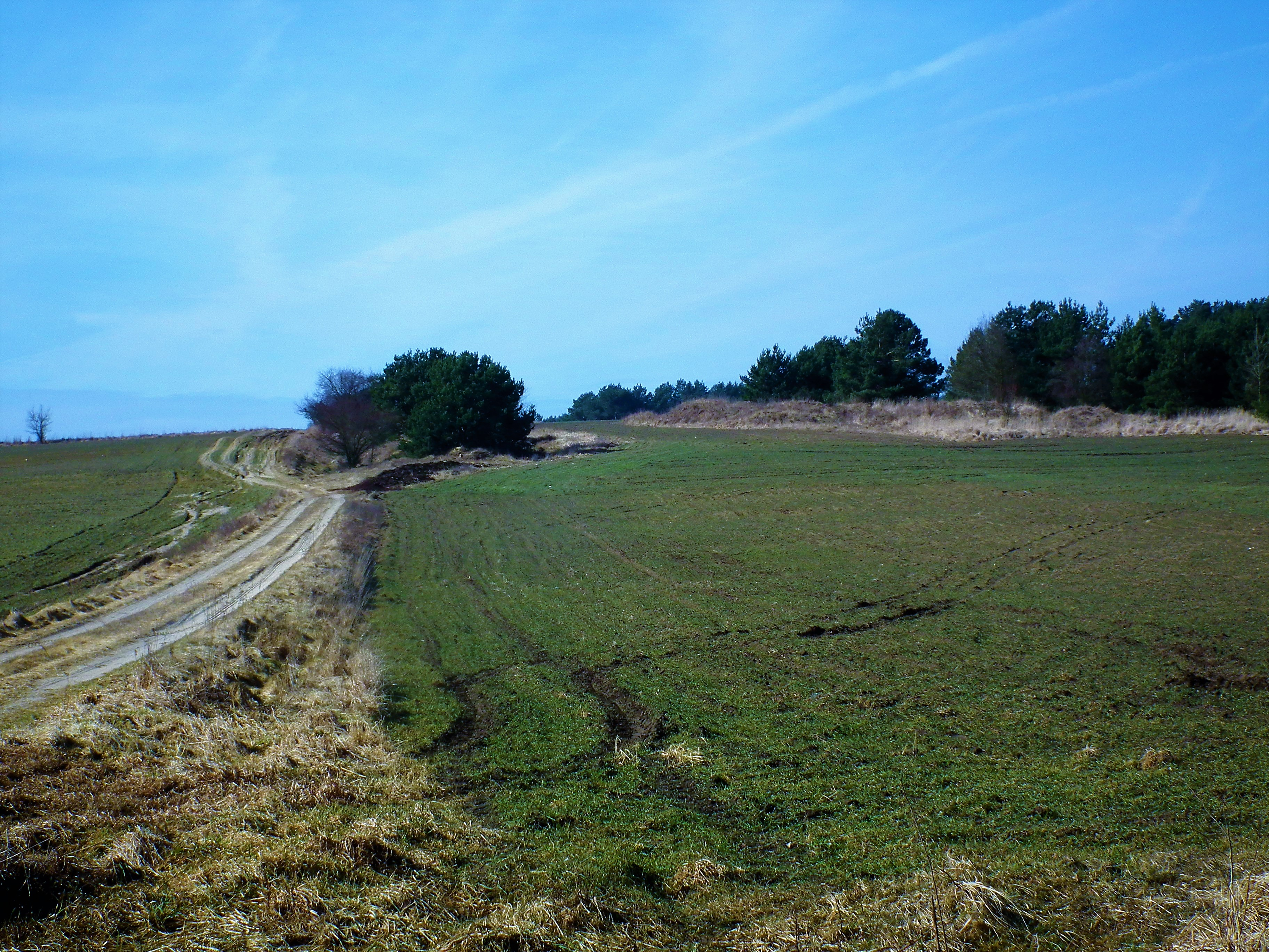 Ziemińskie Góry - ostaniec erozyjny w gm. Wielichowo.